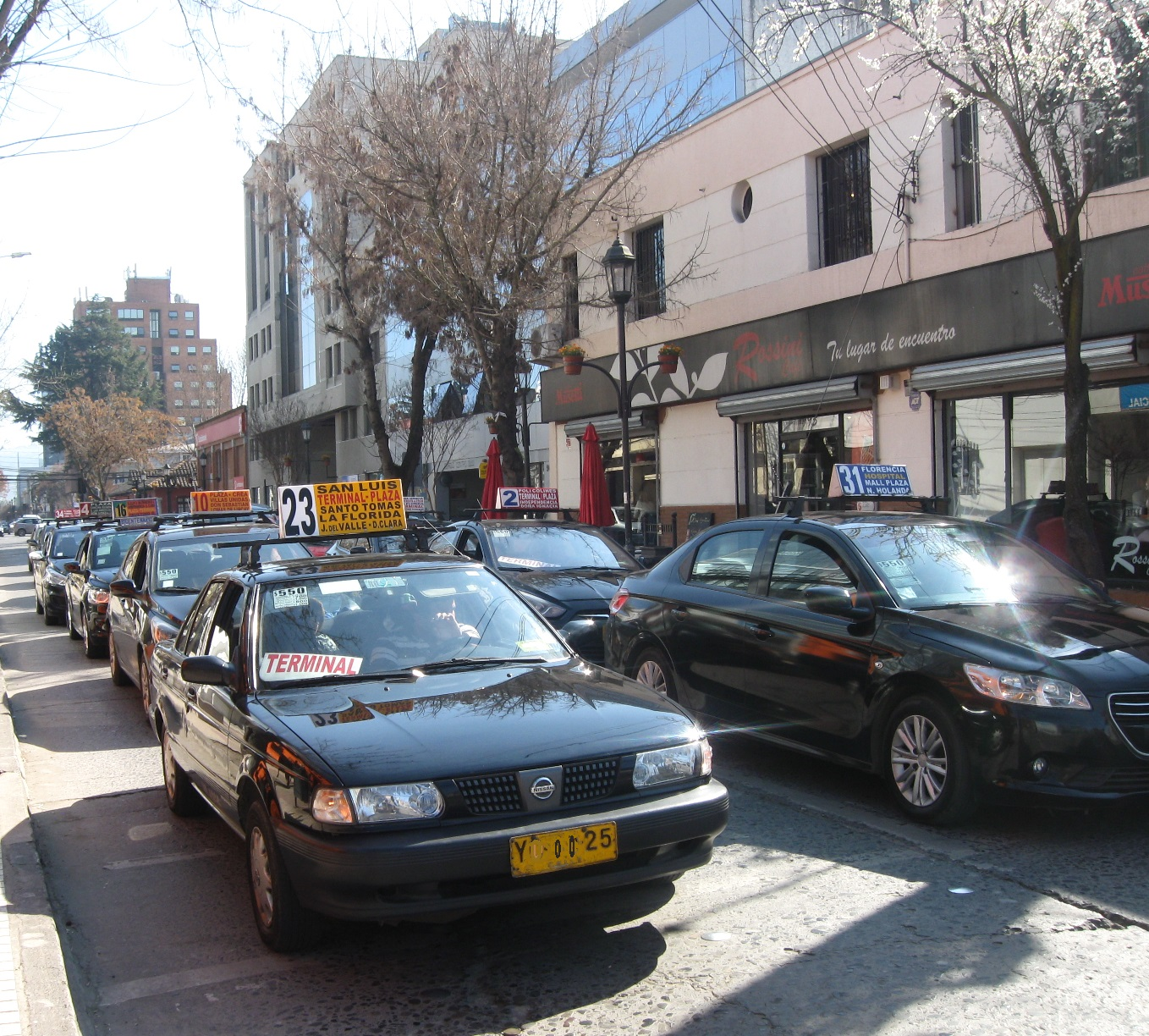 Colectivos en la 1 Norte en Talca (Chile)